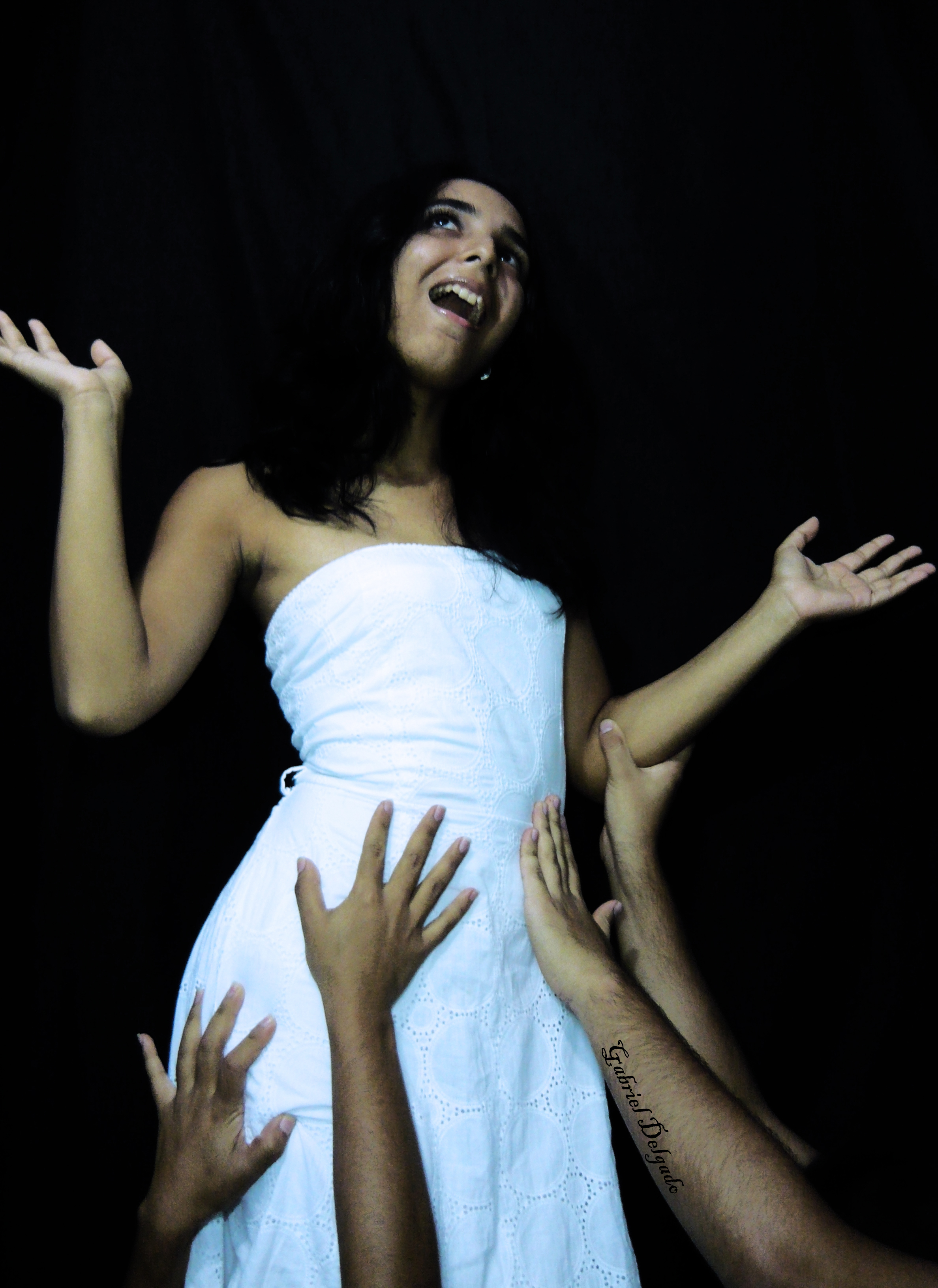 Serie: Pecados Capitales Soberbia IV: They want a piece of me Modelo:Irma Pinto Maquillaje - Iluminación: Naleyger Chacón Concepto y Fotografía: Gabriel Delgado Si se que quite unos pedazos de dedo... Jejeje pero bueno... Que se hace... El concepto de la foto me gustó mucho, y no quería dejar de subirla... )